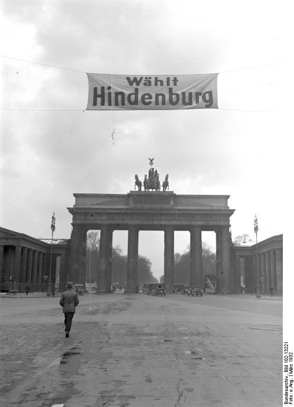 Wahlpropaganda für den Reichspräsidenten von Hindenburg ! Wahltransparente am Brandenburger Tor, dem Wahrzeichen Berlins.